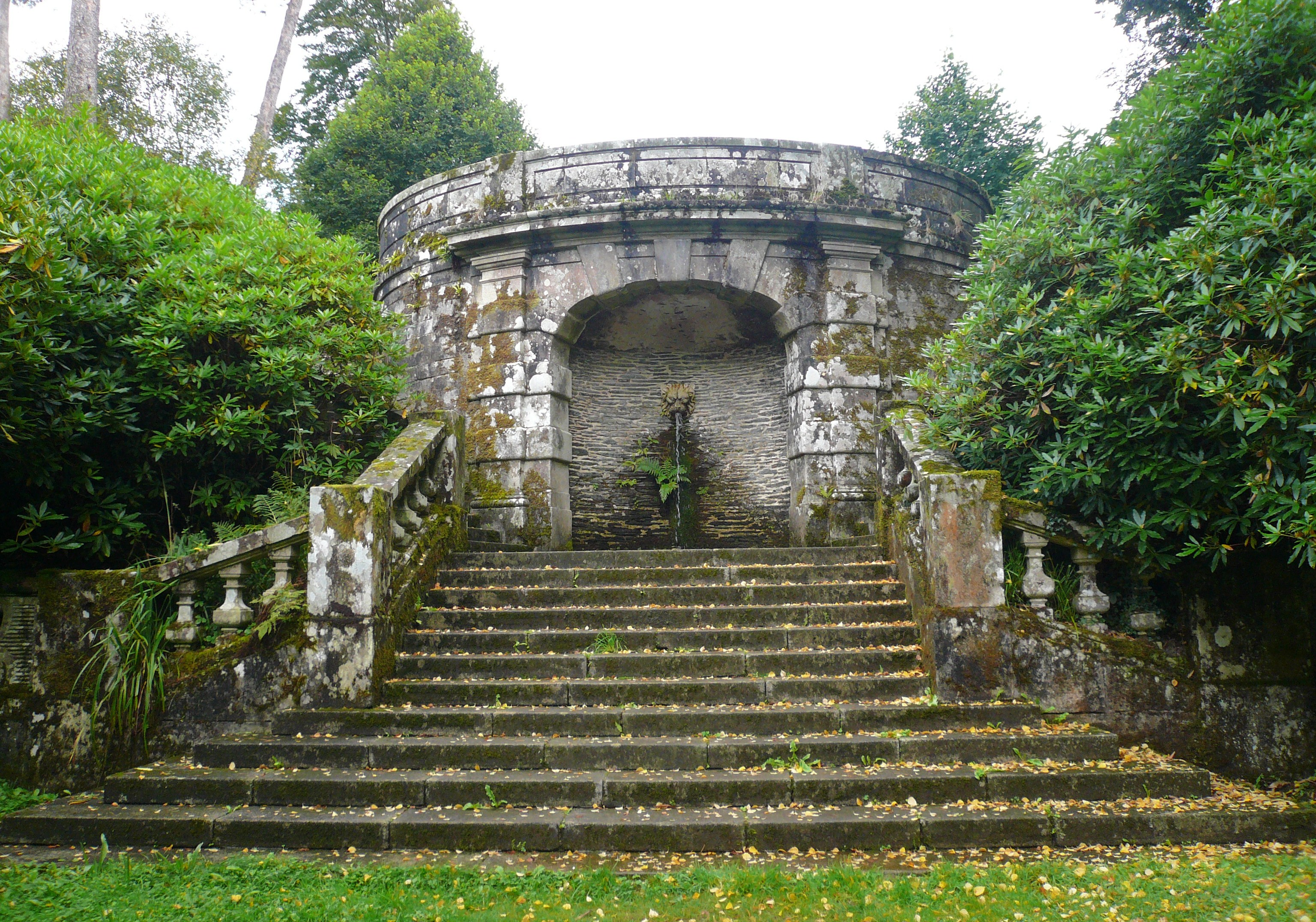 Le belvédère du parc du château de Trévarez, Saint-Goazec, Finistère, Bretagne, France.